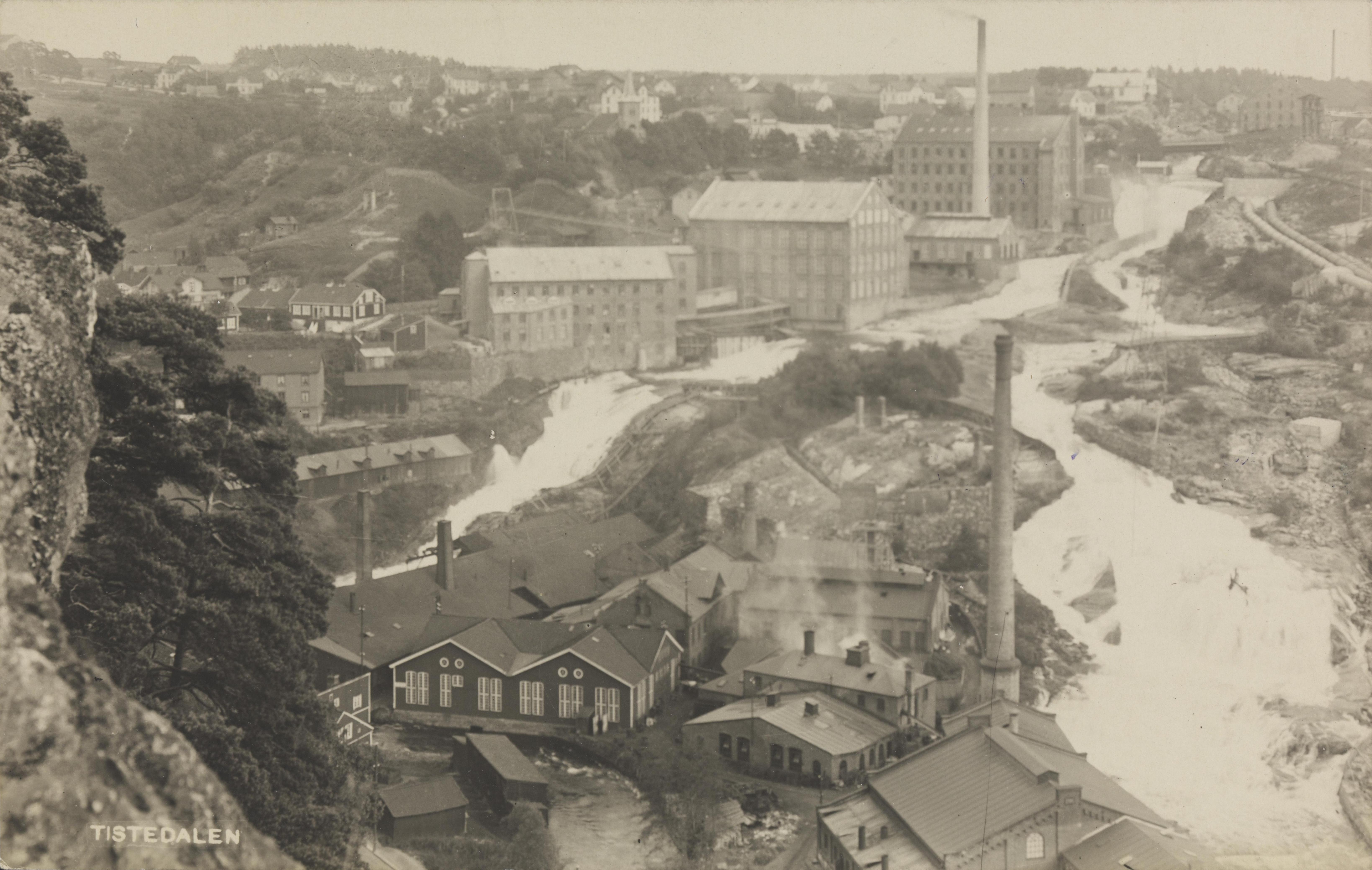 Bildet er hentet fra Nasjonalbibliotekets bildesamling Tistedal, Halden, Østfold